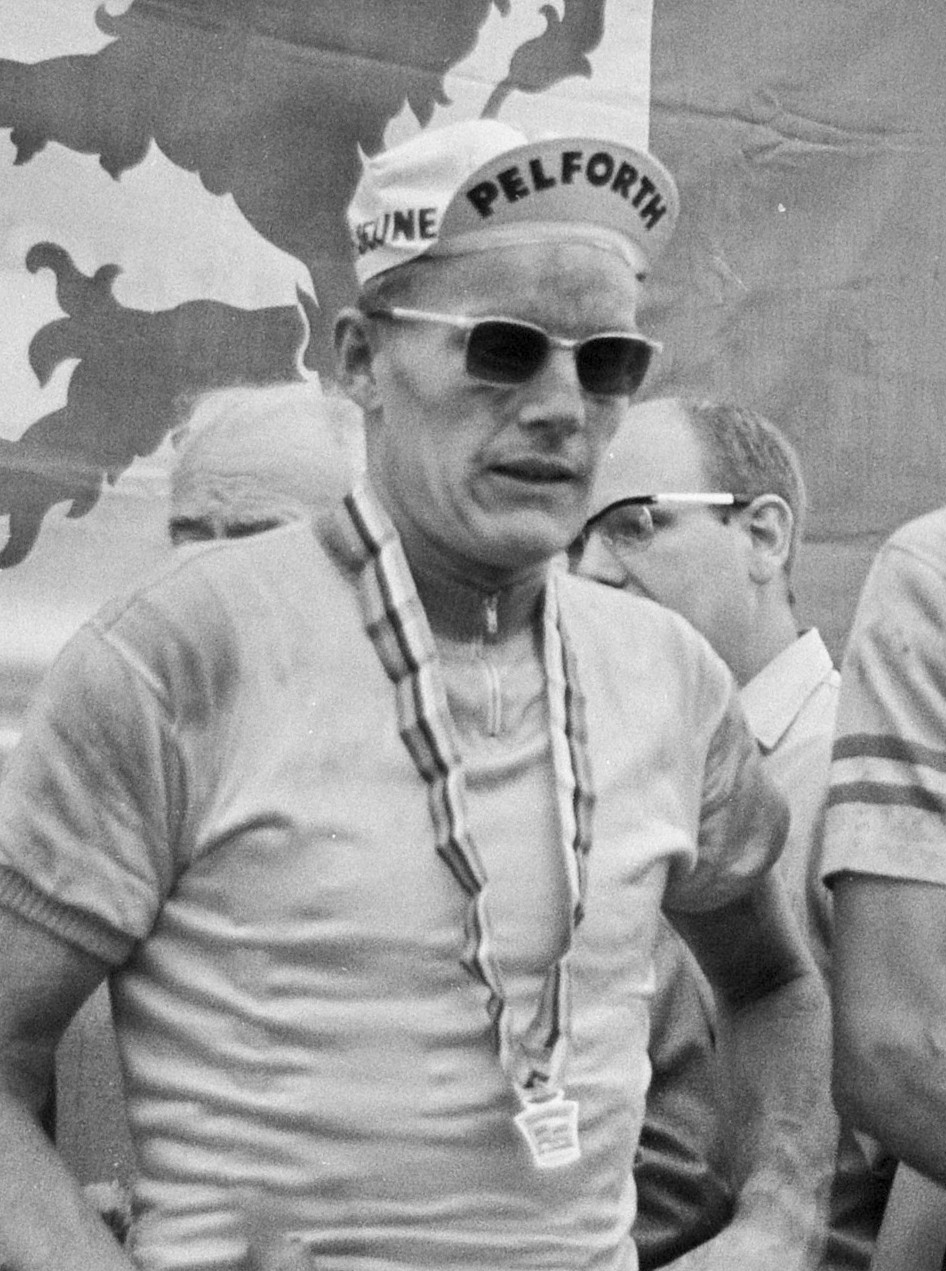 WK Wielrennen te Heerlen finish profs. Janssen (2), Merckx en Spanjaard